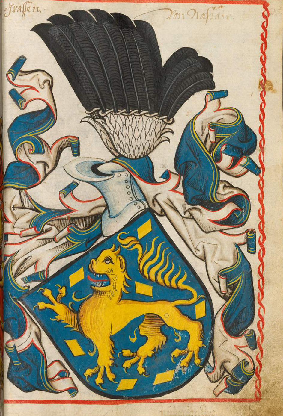 Scheiblersches Wappenbuch, älterer Teil: Grafen von Nassau